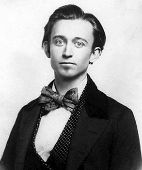 Lucius Frederick Hubbard.